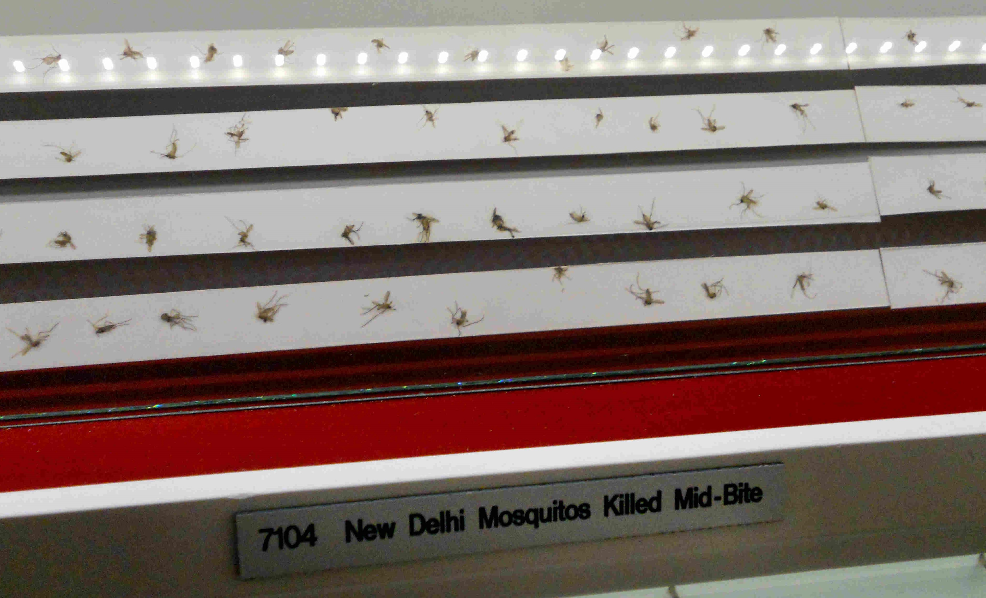 Sammlung 2014 erschlagene Moskitos aus New Delhi